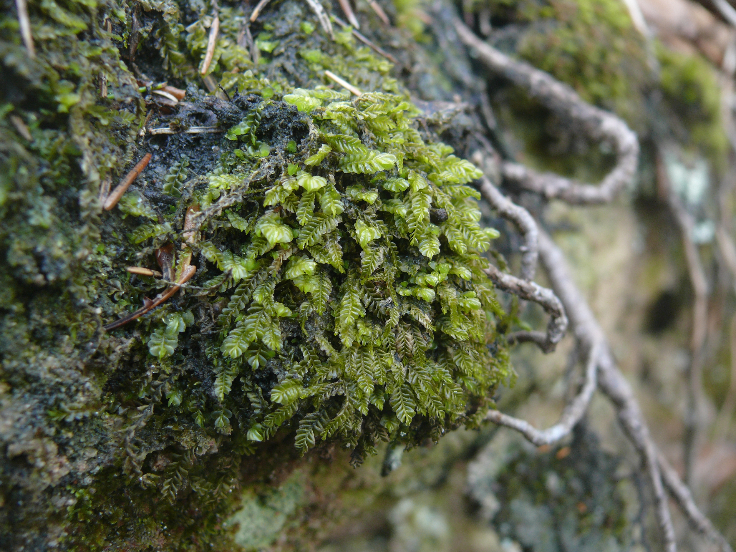 Plagiochila porelloides, Schwäbisch-Fränkische Waldberge, Deutschland